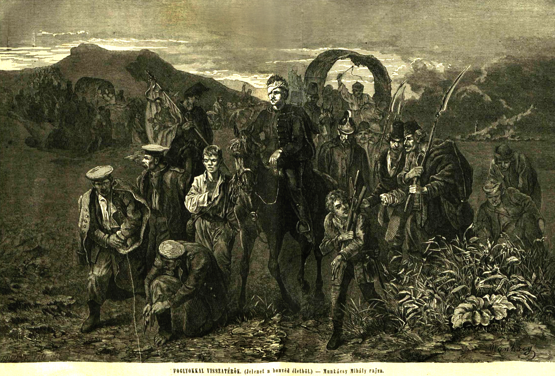 Munkácsy még Münchenben tanult, amikor megbízást kapott Szokoly Viktortól, hogy egy tervezett album számára rajzokat készítsen a szabadságharc történetéből. A Honvédalbum 1868-ban jelent meg Pesten Szokoly Viktor szerkesztésében, Emich Gusztáv kiadásában. Az album Munkácsy Mihály alkotásai mellett Wágner Sándor, Litzenmayer Sándor, Benczúr Gyula, Jankó János és Szinyey Pál rajzait tartalmazza. A fametszetek Rusz Károly pesti műhelyében készültek. Munkácsy két rajzának fametszete szerepel benne Honvéd-ujoncozás és Foglyokkal visszatérők címmel.